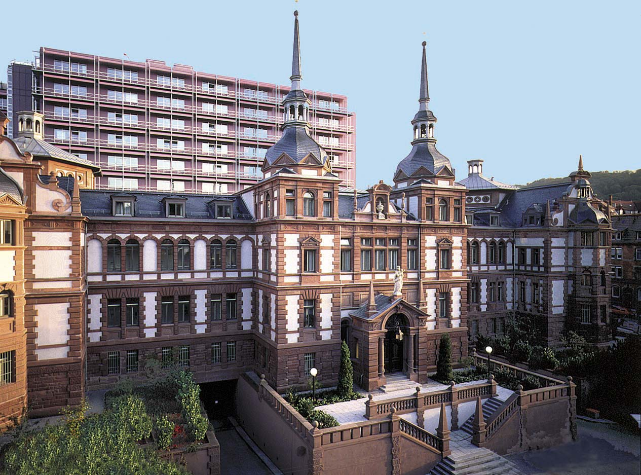 Gebaeudeansicht des Marienhospitals Stuttgart